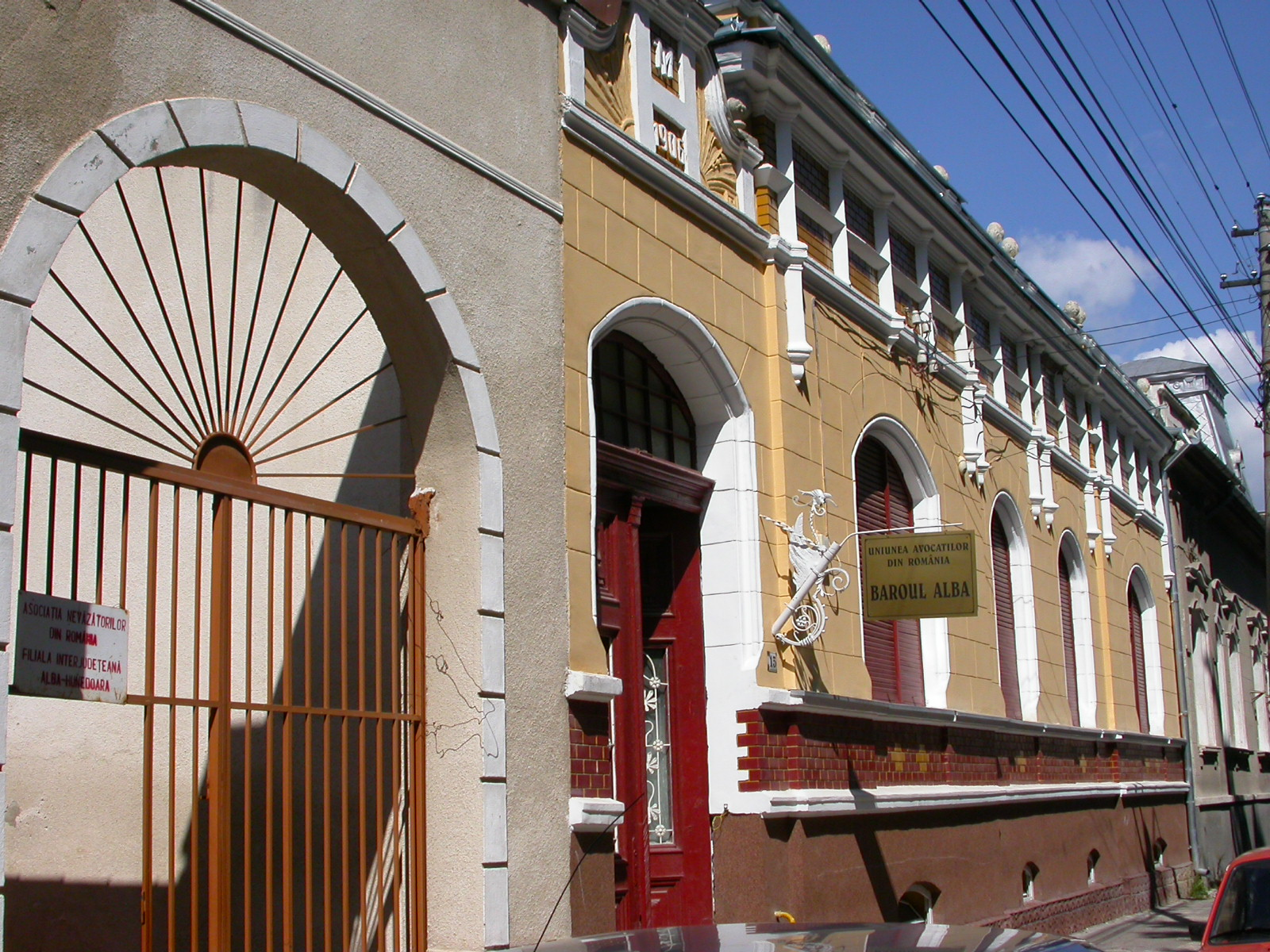 Ansamblul urban "Str. Teilor" sf. sec. XIX